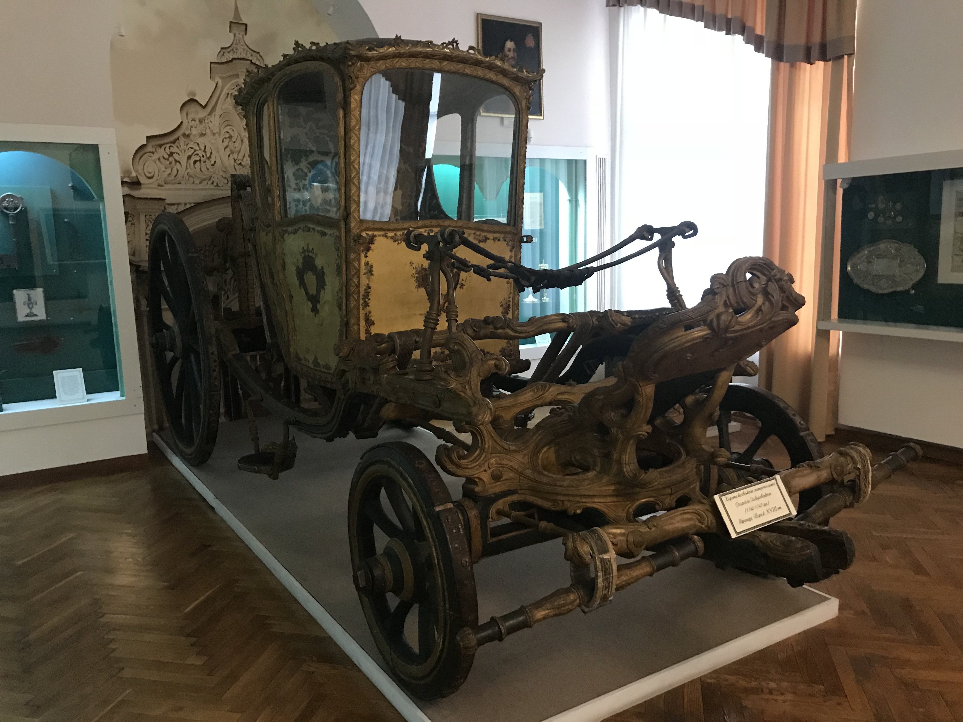 Карета киевского митрополита Рафаила Заборовского (1742-1747), Франция, Париж, XVIII в. Национальный музей истории Украины, Киев